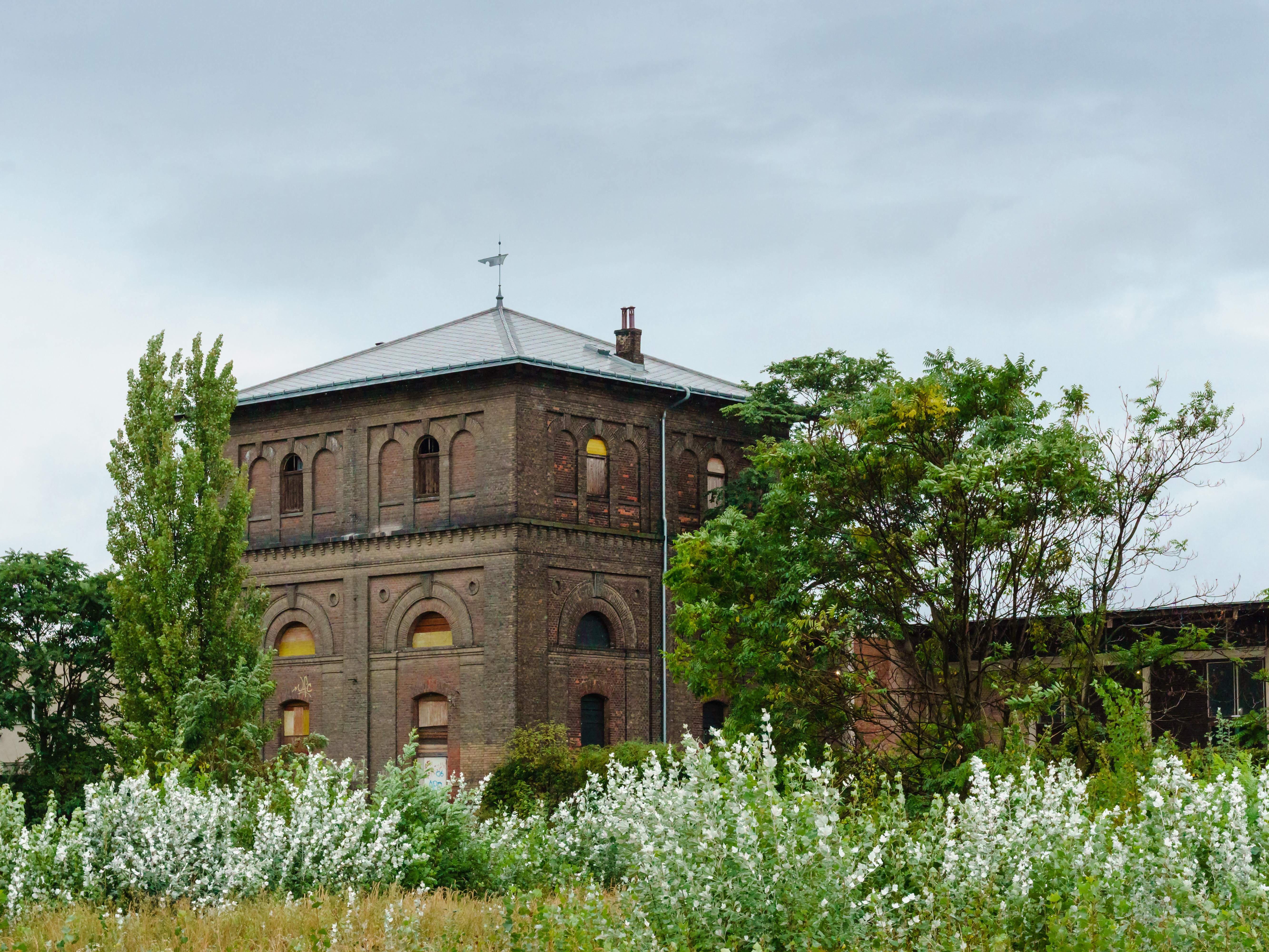 Ehemaliger Wasserturm, Rest des alten Nordbahnhofes, Leystraße in Wien/Leopoldstadt